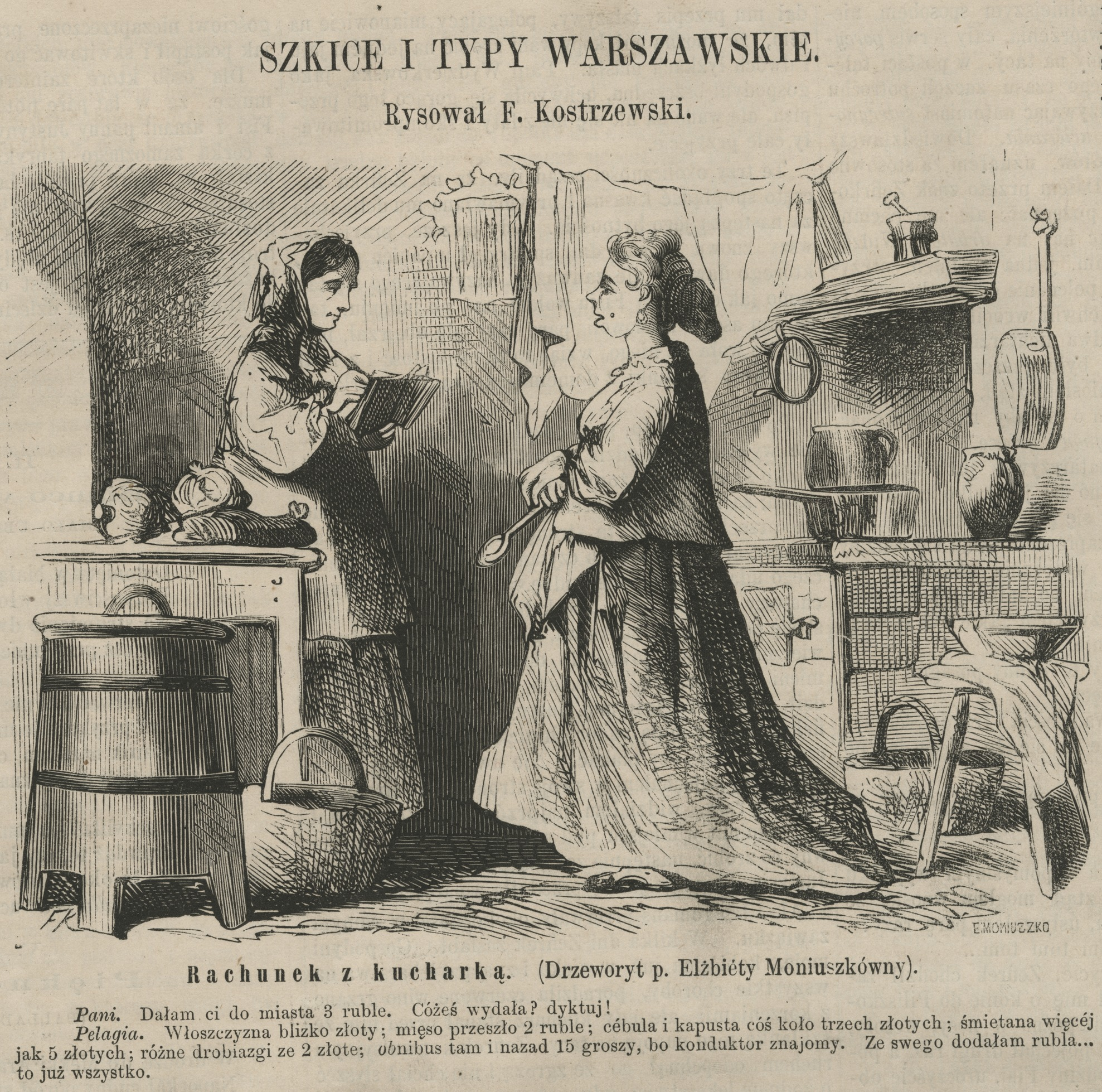 Szkice i typy warszawskie : Rachunek z kucharką : (Drzeworyt p. Elżbiety Moniuszkówny)